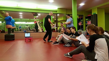 Zahájení kurzu sebeobrany